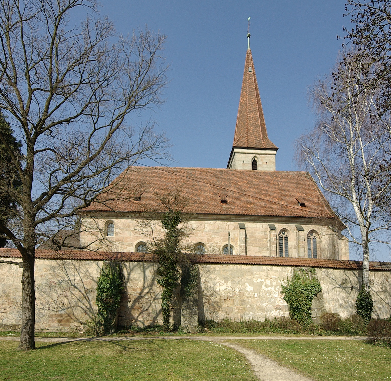 Kirche St. Xystus im Erlanger Stadtteil Büchenbach